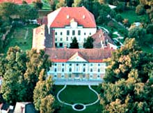 Lauftaufnahme des Schloss Starhemberg in Eferding.